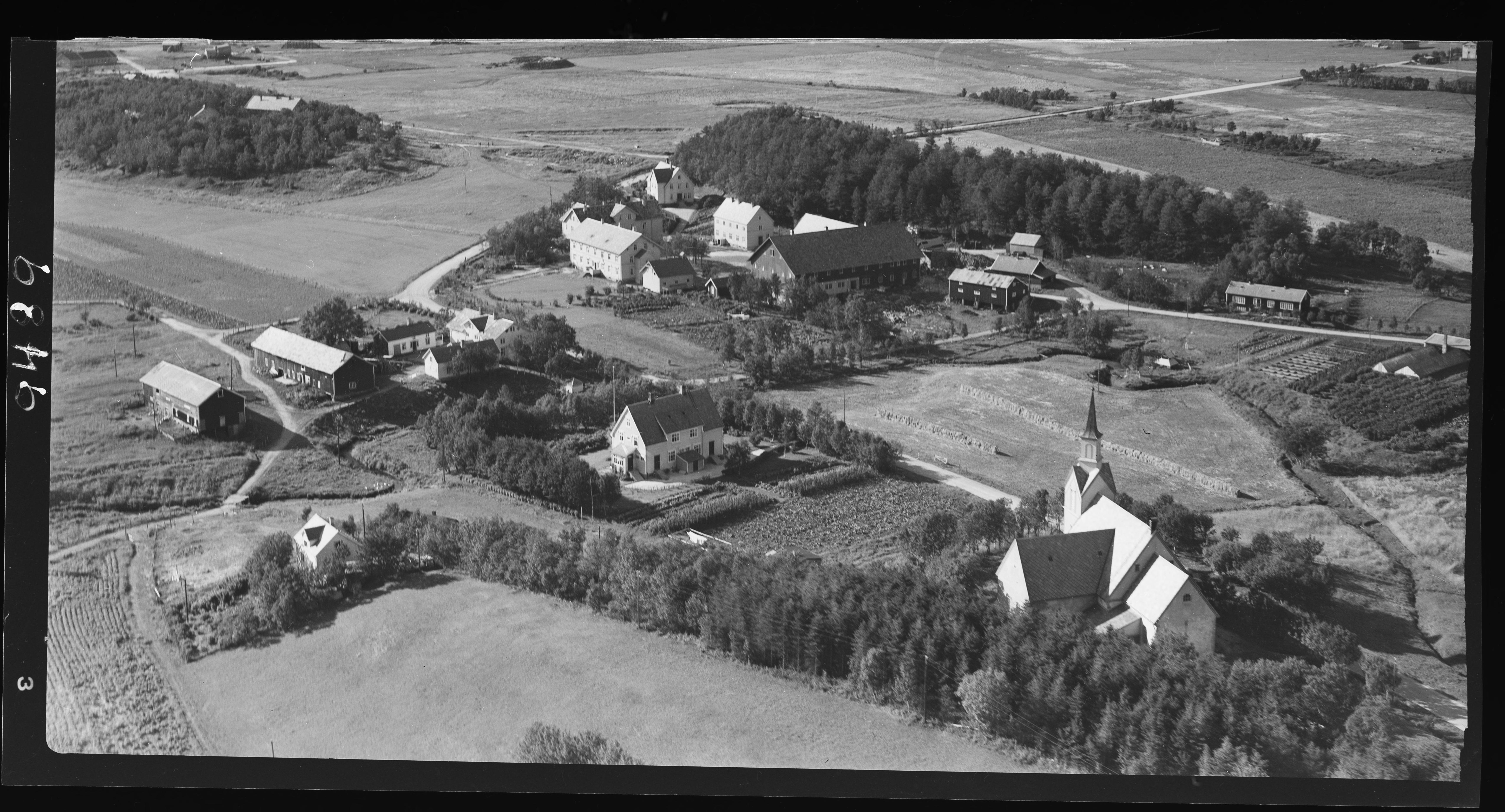 Bildet er hentet fra Nasjonalbibliotekets bildesamling. Anmerkninger til bildet var: Fotograf:Ukjent Bodin,Bodø, Bodø, Nordland